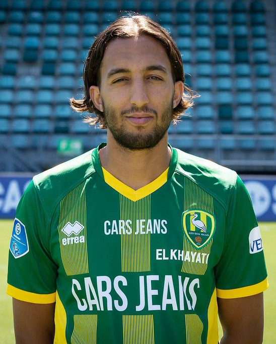 Abdenasser El Khayati